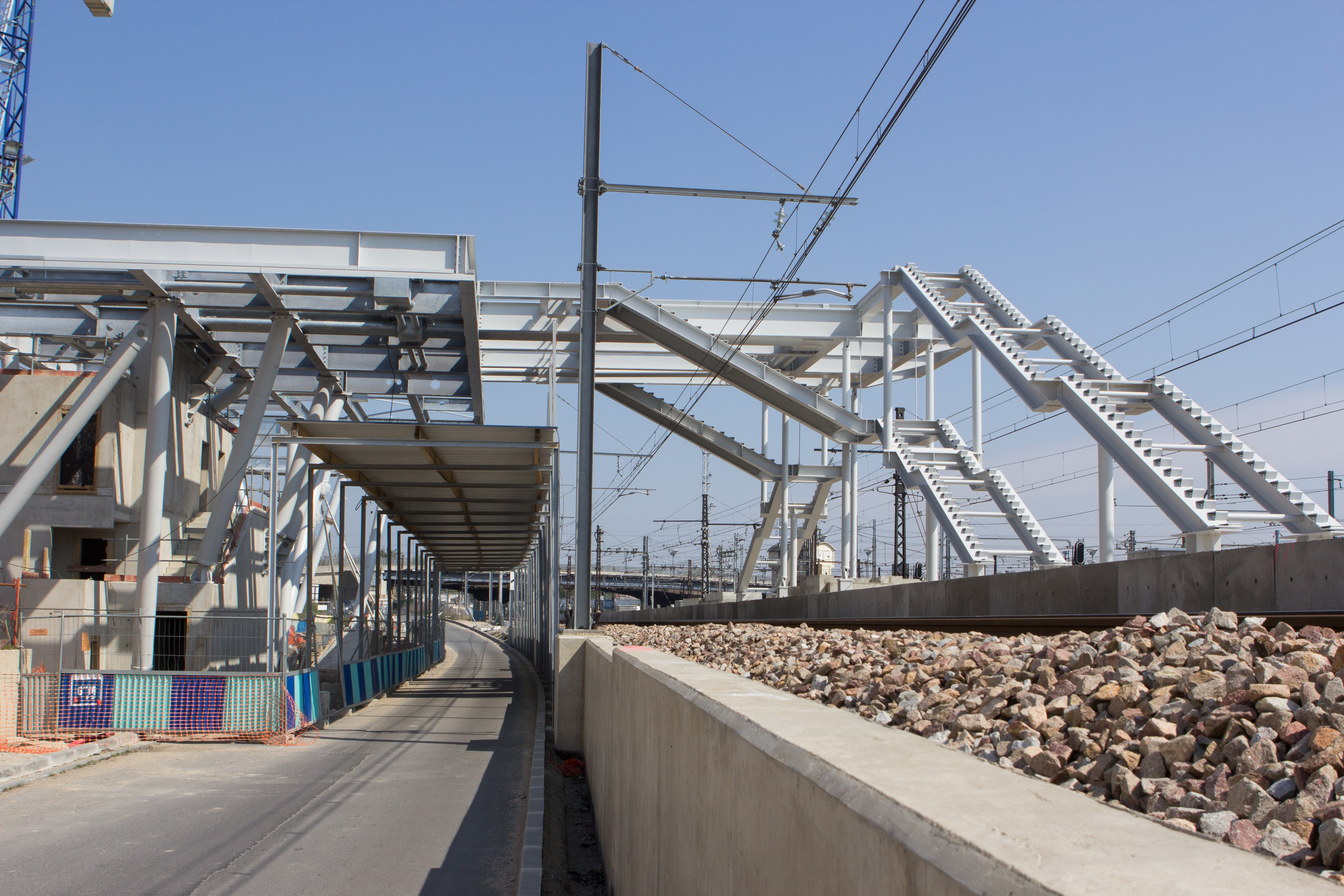 Vue de la gare de Créteil-Pompadour en travaux en avril 2013 (vue des accès au quai). Ligne D du RER, Val-de-Marne, France.